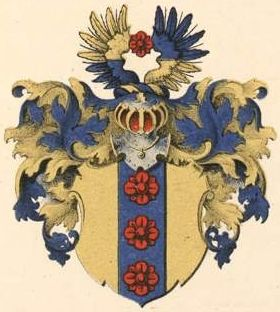 Benckendorffi suguvõsa aadlivapp